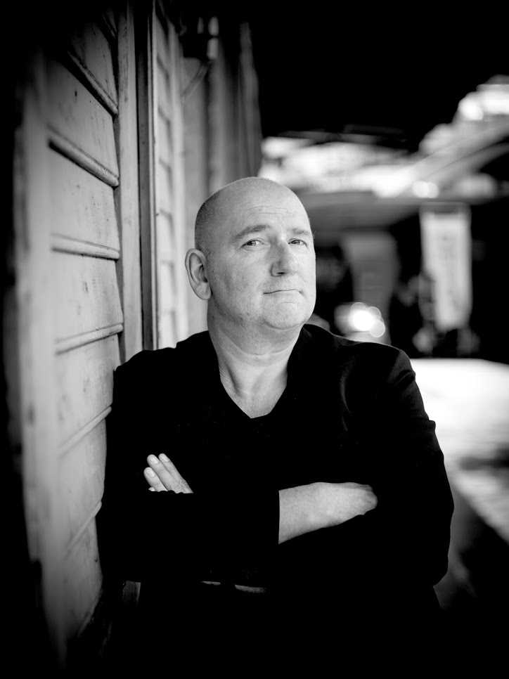 Thomas Gratzer, Foto von Ingo Pertramer